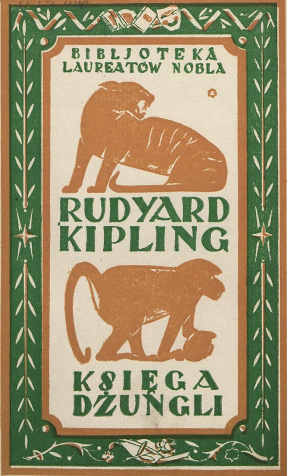 Okładka książki "Księga dżungli" (wyd. 1923)